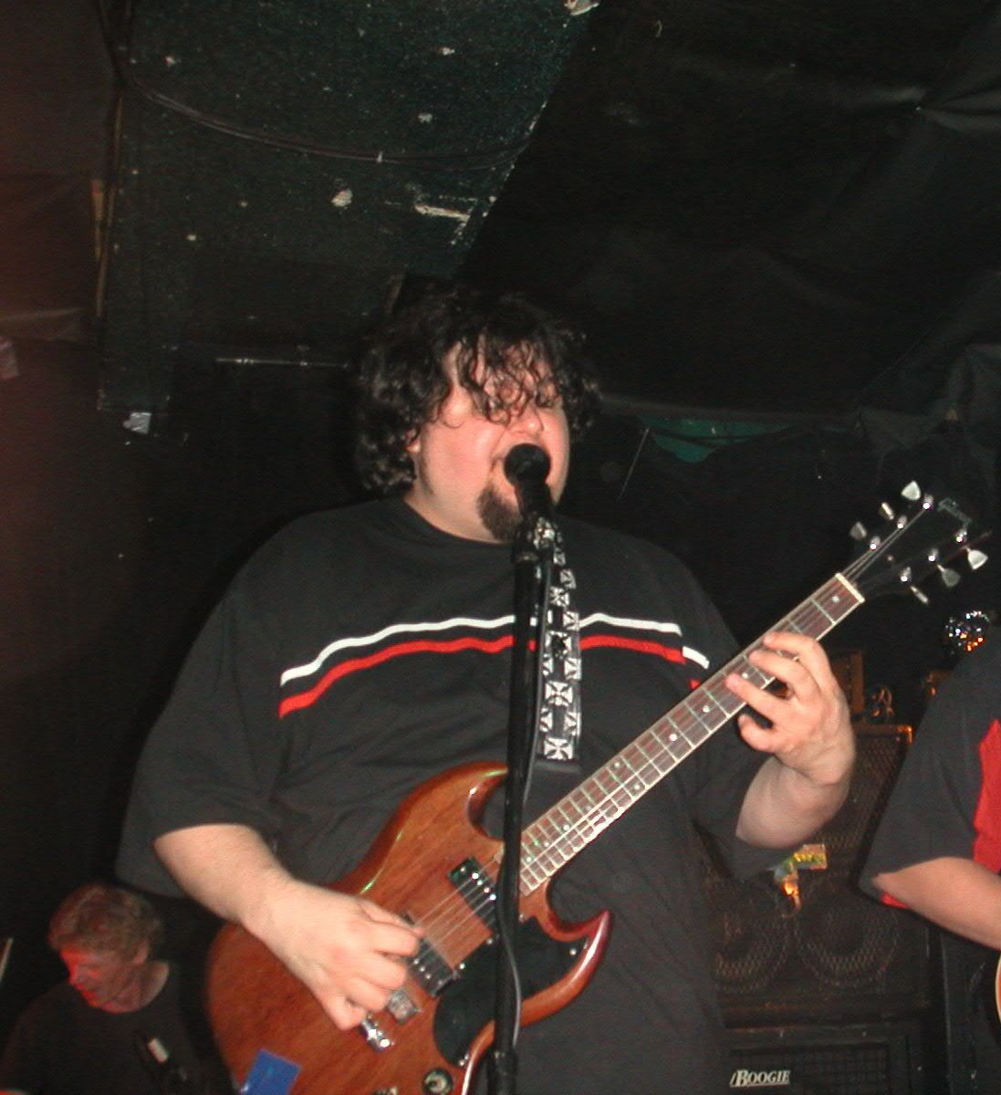 Ван Коннер, гитарист Screaming Trees